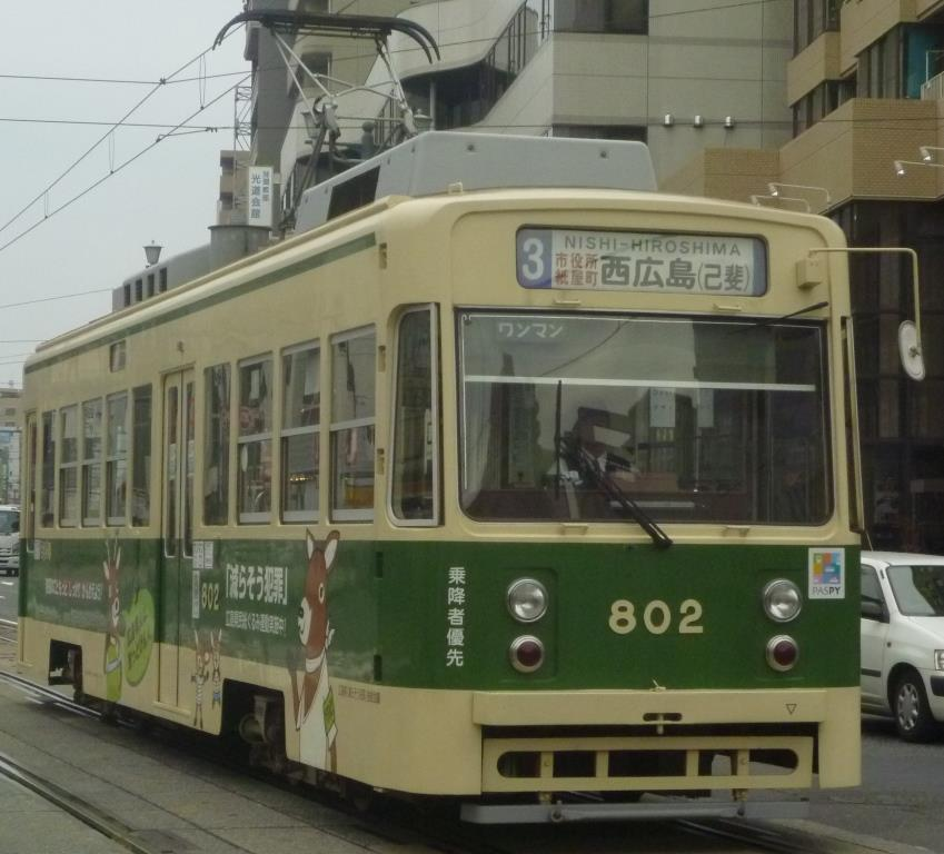 広電802号